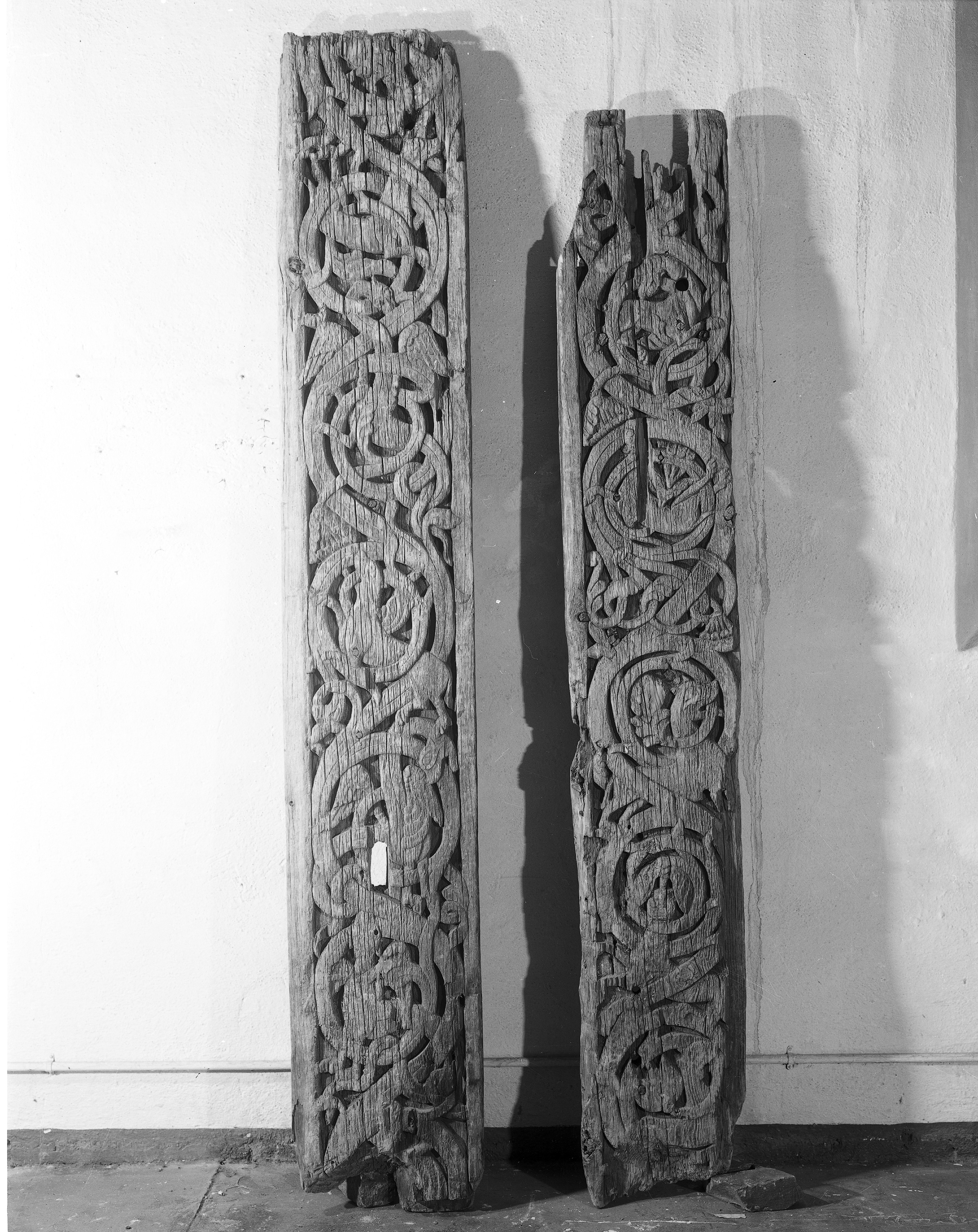 Stavkirkeportaler fra Bødalen i Gausdal, nå i Kulturhistorisk museum i Oslo. Foto: Ole Holst. Museumsnummer: C33291.